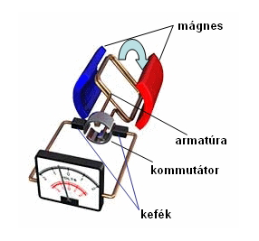 Az egymenetes egyenáramú generátor